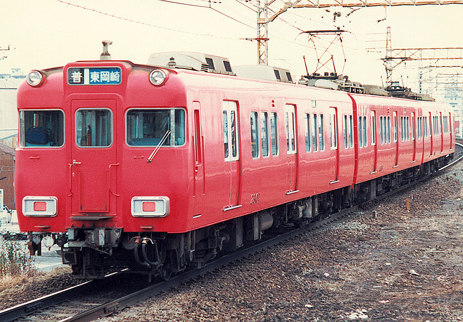 名古屋鉄道 2301+3351+3301